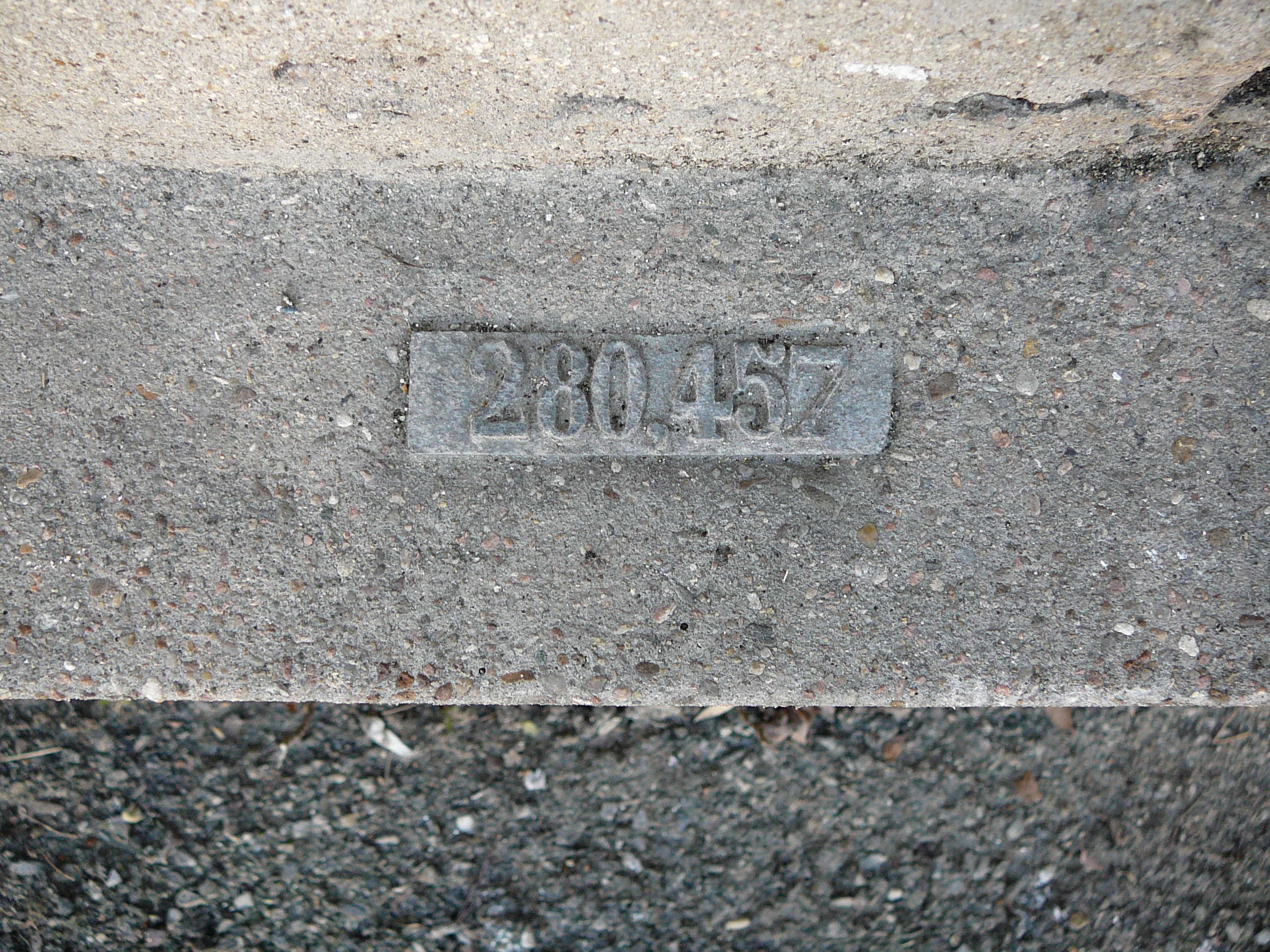 Altitude en mètres inscrite dans une pierre du fort Saint-Irénée à Lyon: 280,457m.